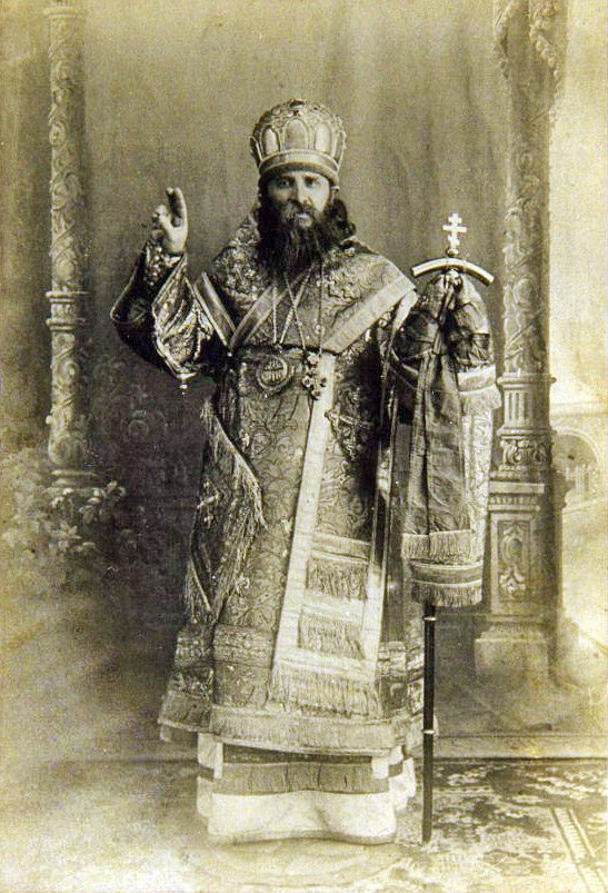 единоверческий епископ Амвросий (Сосновцев Андрей Иванович). Мстёра